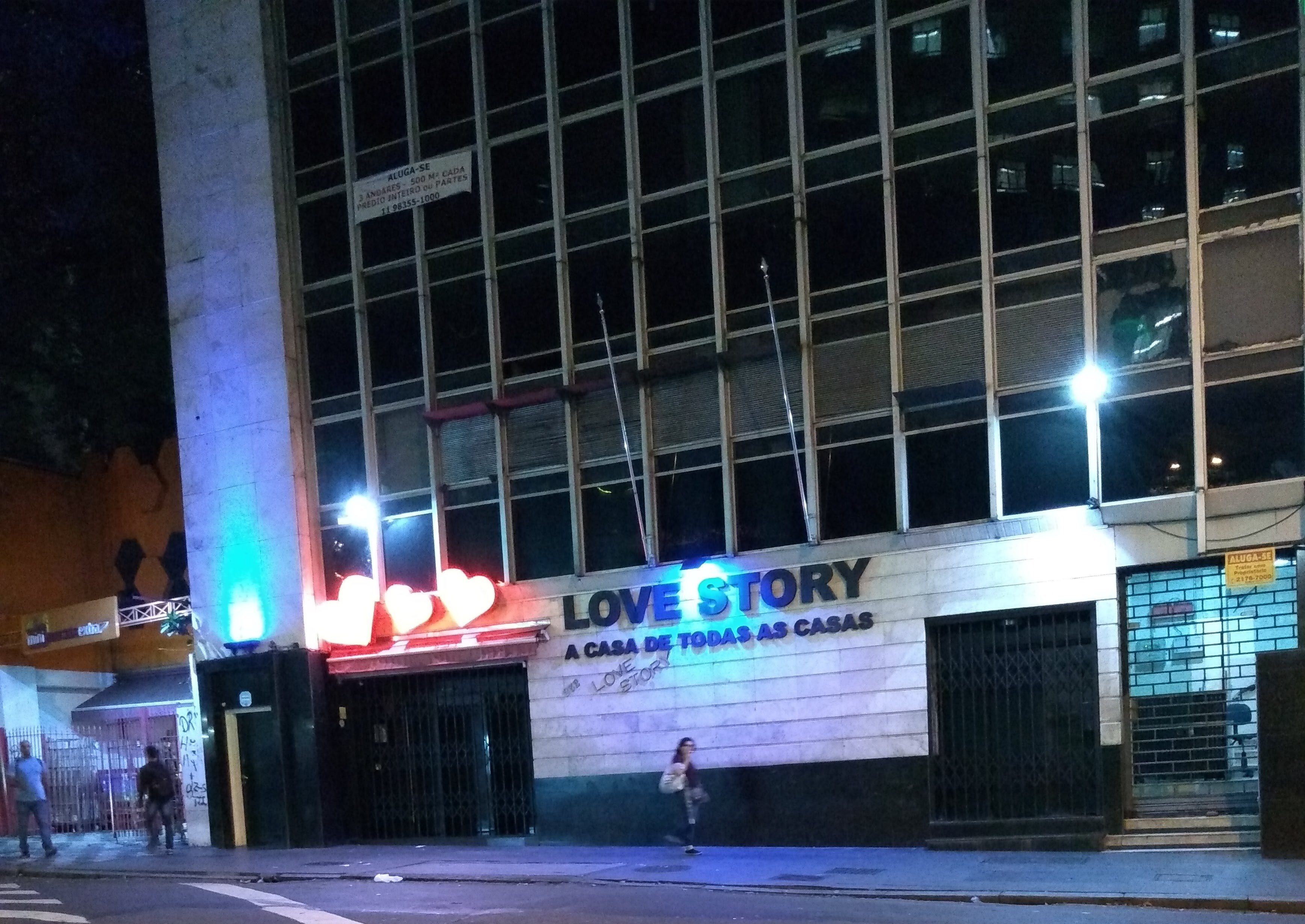 Fachada da danceteria Love Story, em São Paulo, 2018.